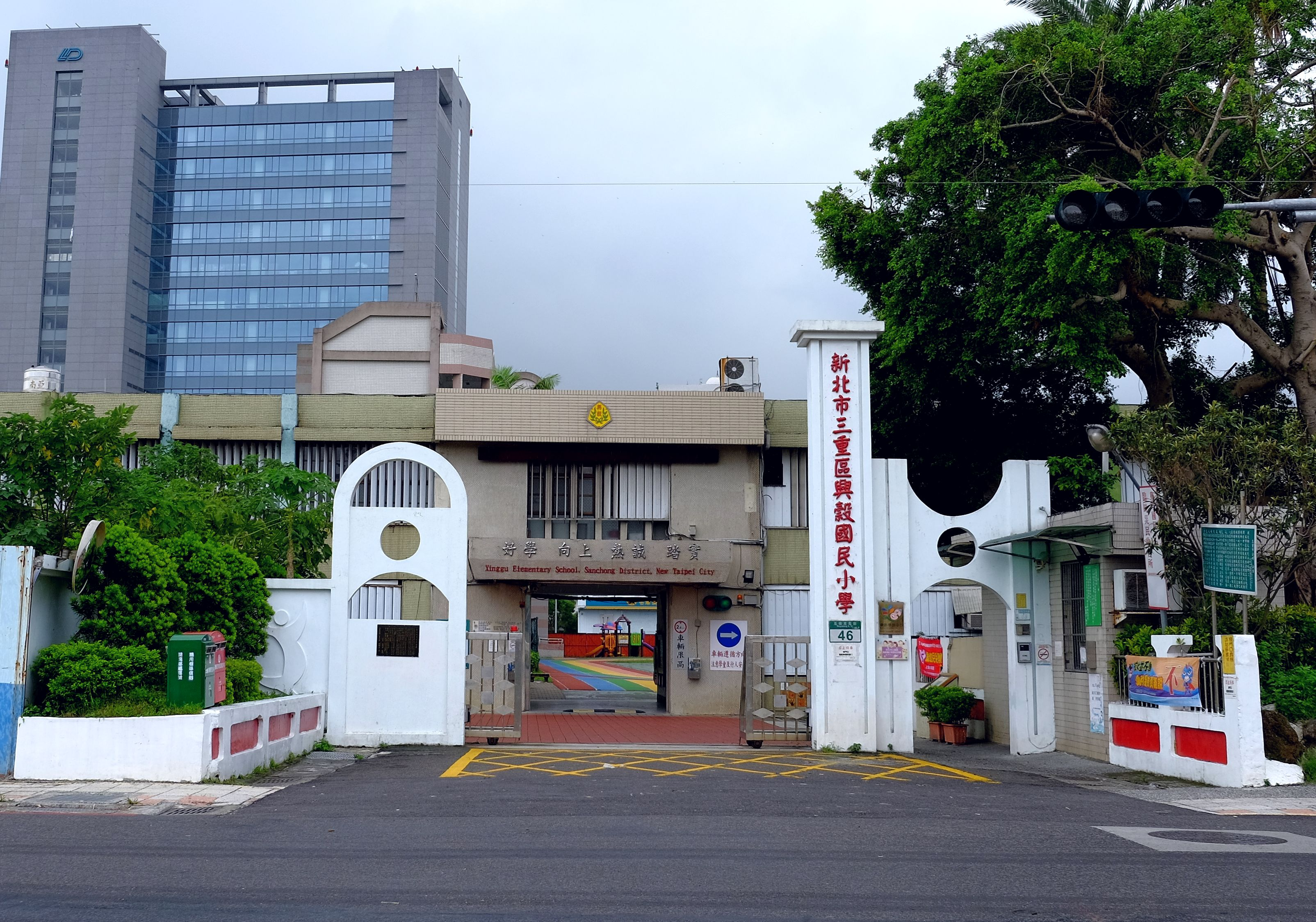 興穀國民小學大門